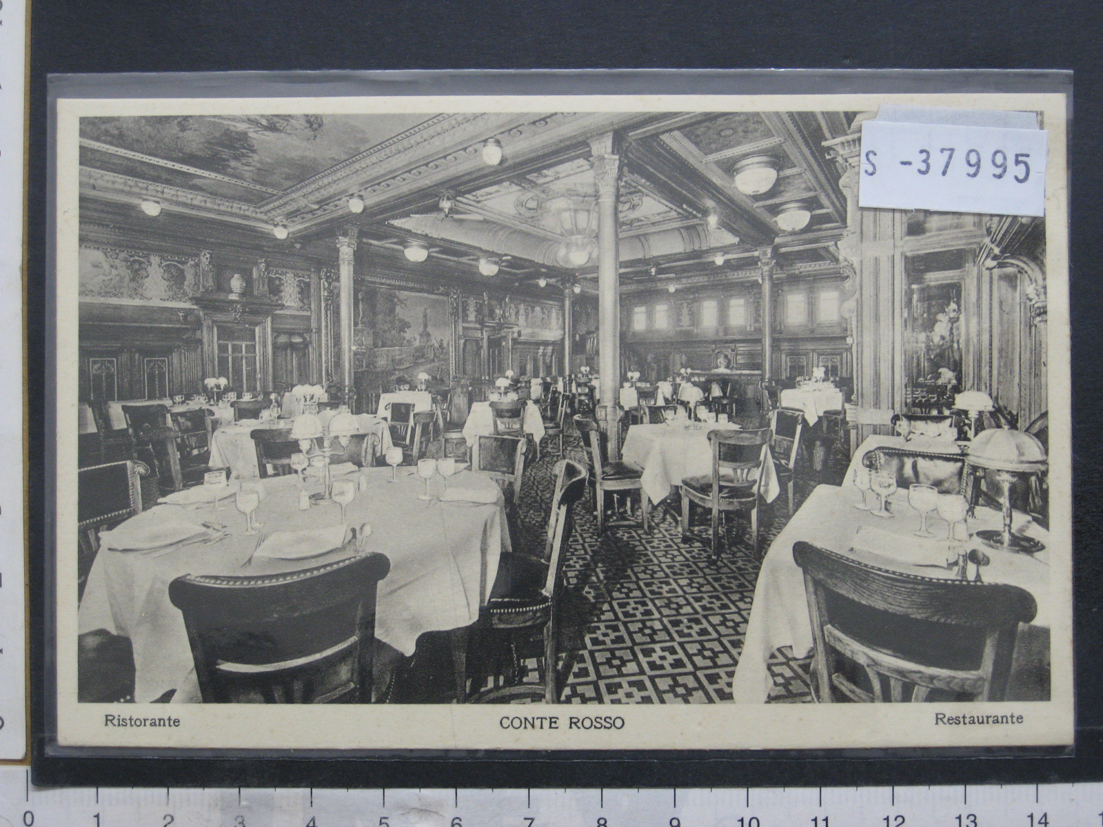 Conte Rosso (transatlantico)